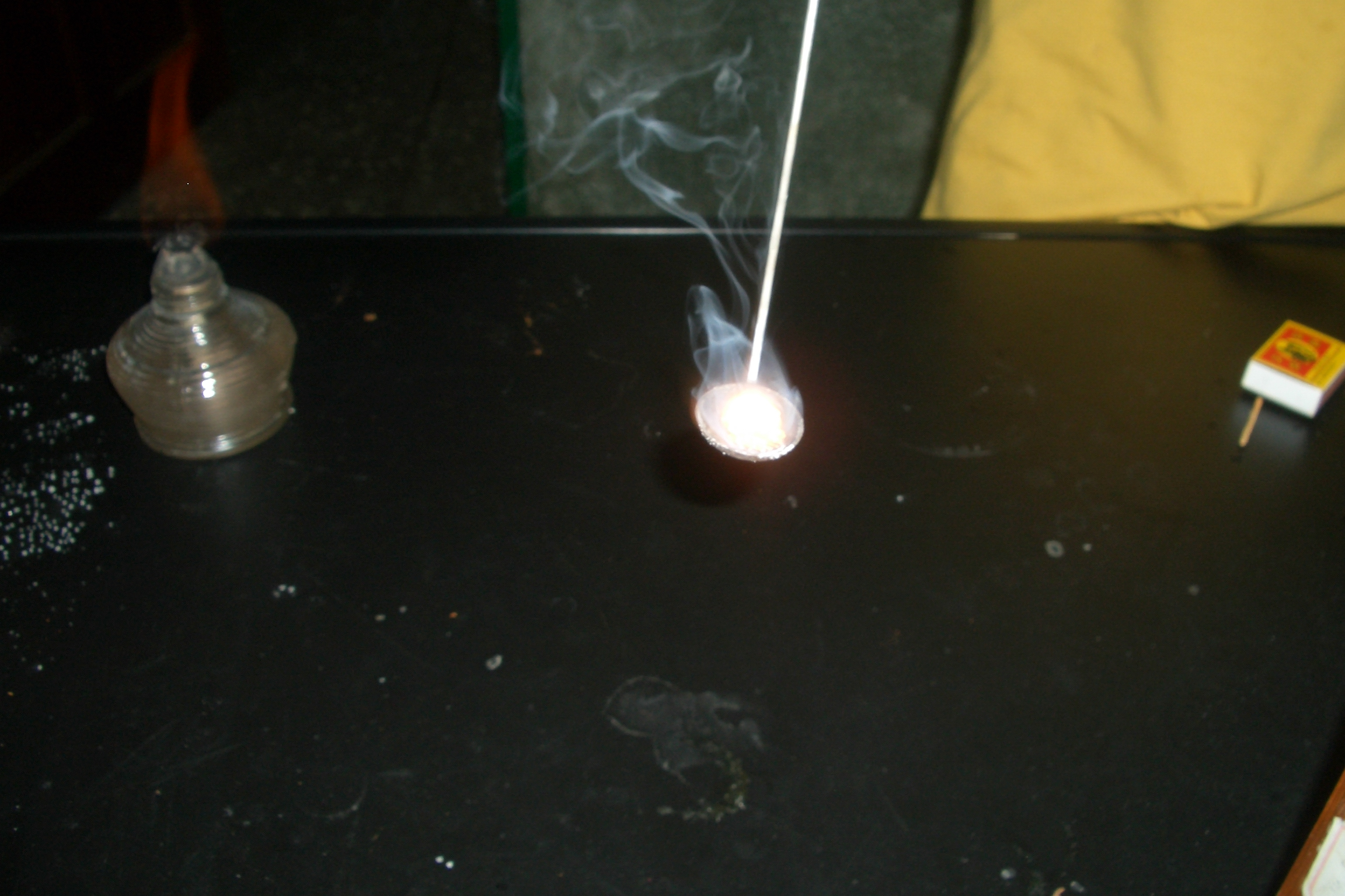 中文（台灣）: 燃燒鋰金屬